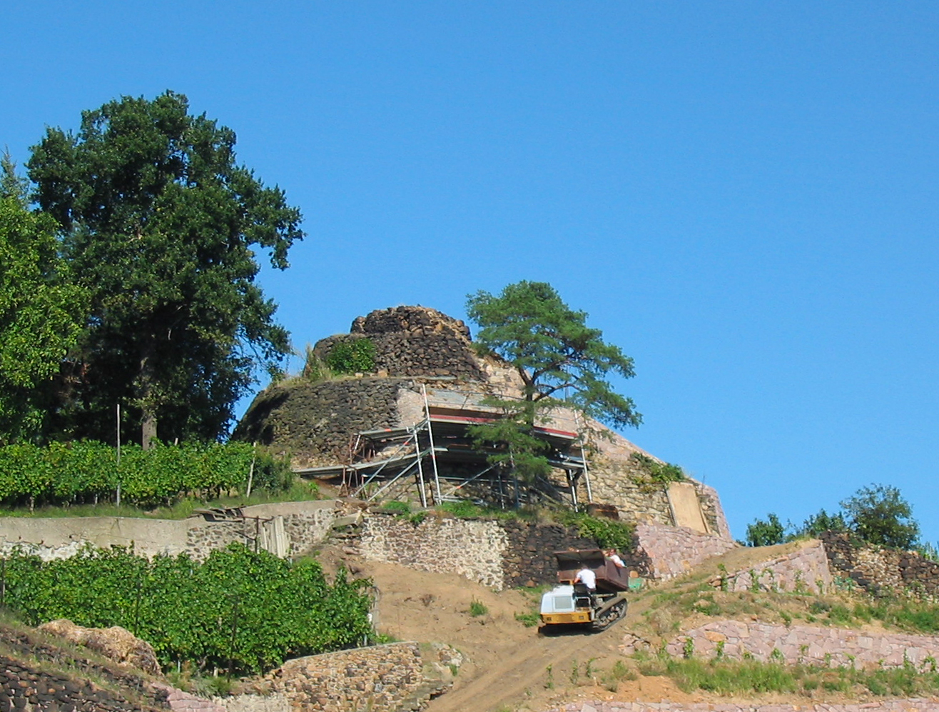 Cikkurat in Radebeul, Nahansicht mit Transportraupe